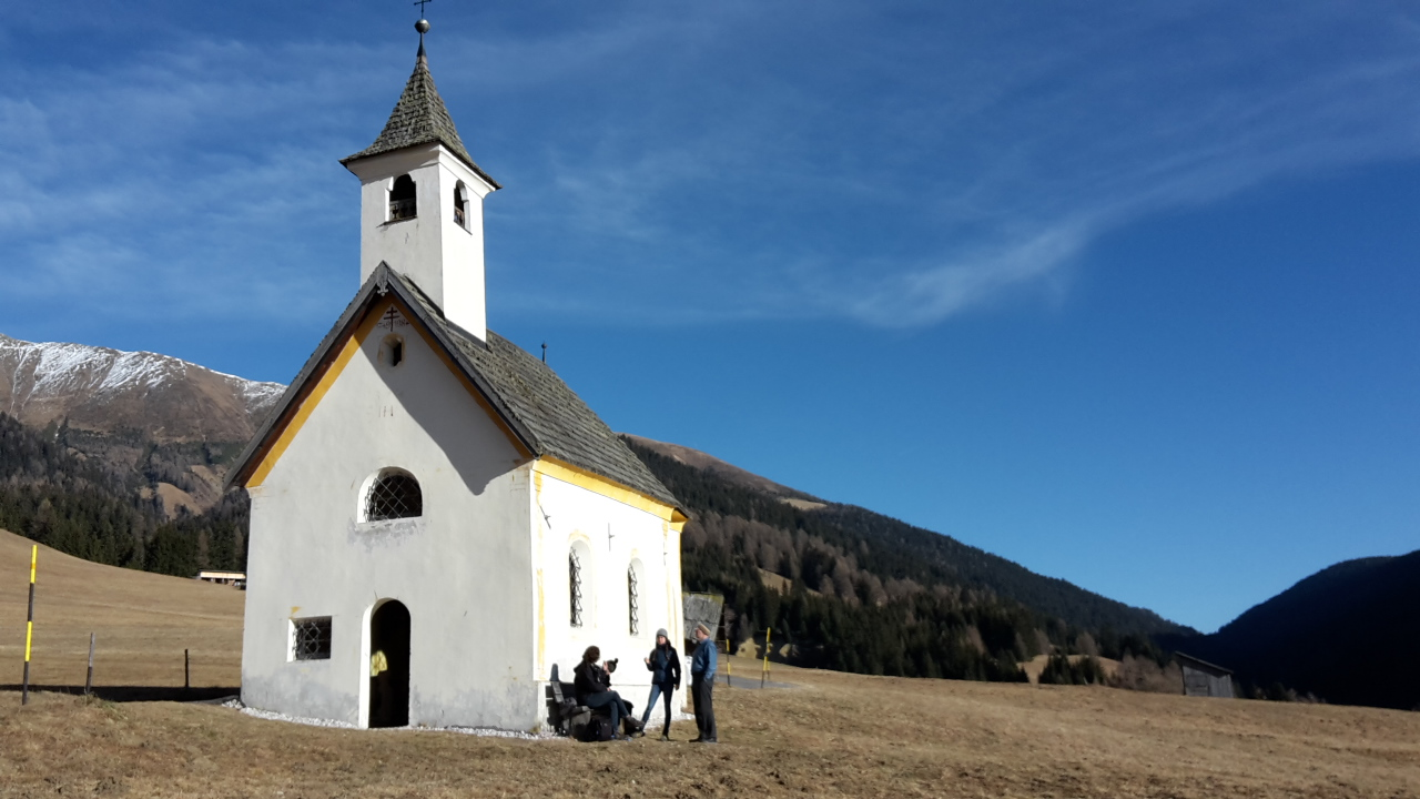 Kapelle in Kandellen bei Toblach in Südtirol